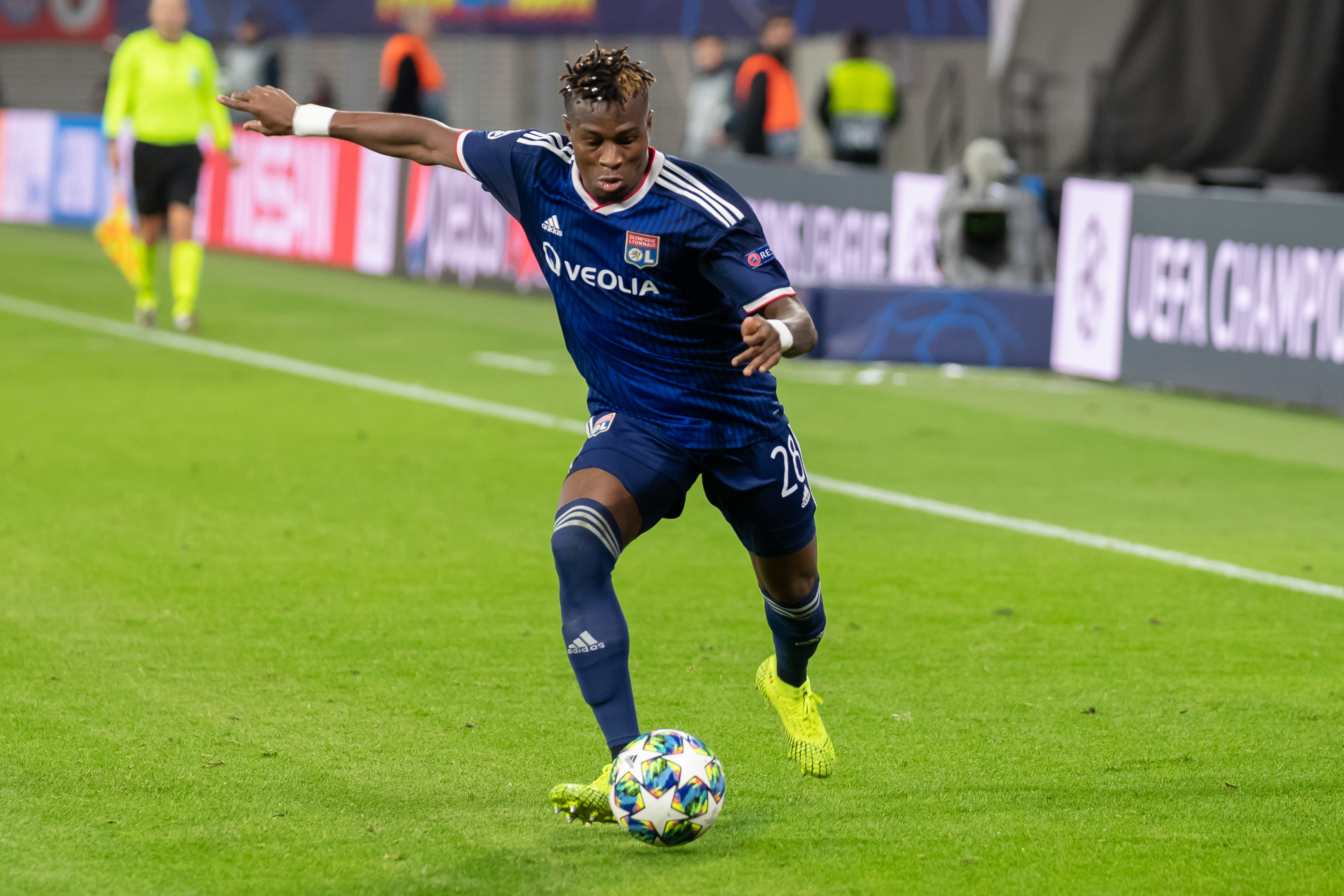 Fußball, Männer, UEFA Champions League, RB Leipzig - Olympique Lyonnais; Youssouf Kone (Olympique Lyonnais, 28); Freisteller, Einzelbild, Aktion, action